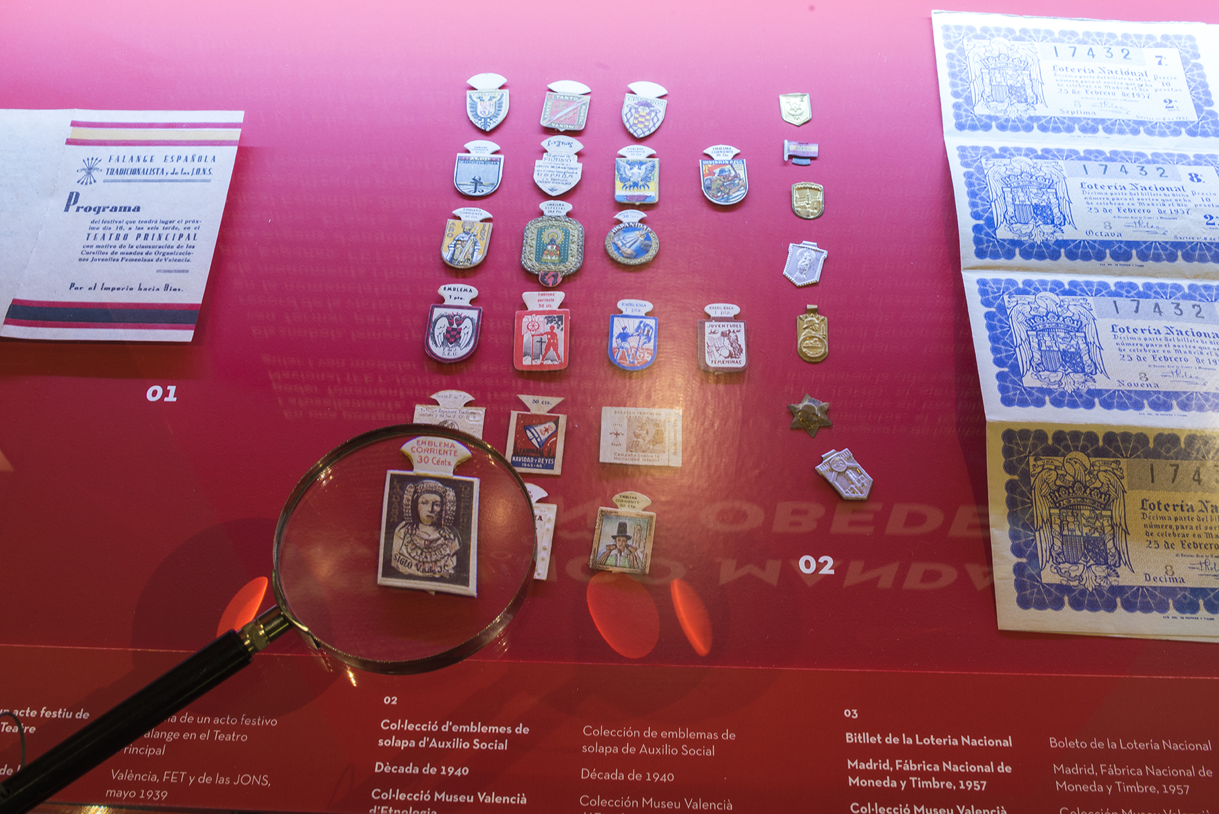 Exposició temporal del Museu Valencià d'Etnologia Prietas las filas. Vida Quotidiana al Franquisme. Del 19 de setembre del 2018 al 6 de gener del 2019.